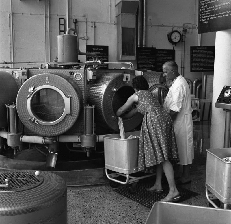 Im Waschhaus der Wohnsiedlung Nürnberg-Zollhaus